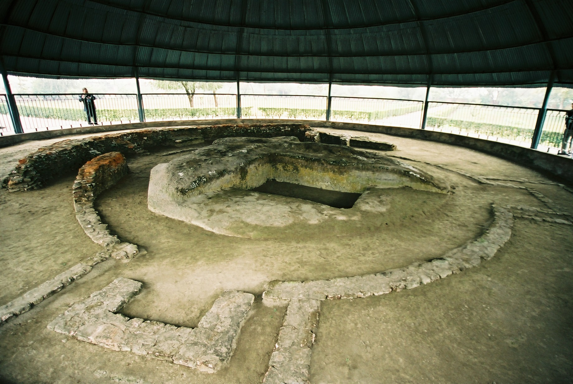 お釈迦様の遺骨を最初に納めた８つのストゥーパの１つ。 (2005/01/24 Vaishali, Bihar, INDIA)